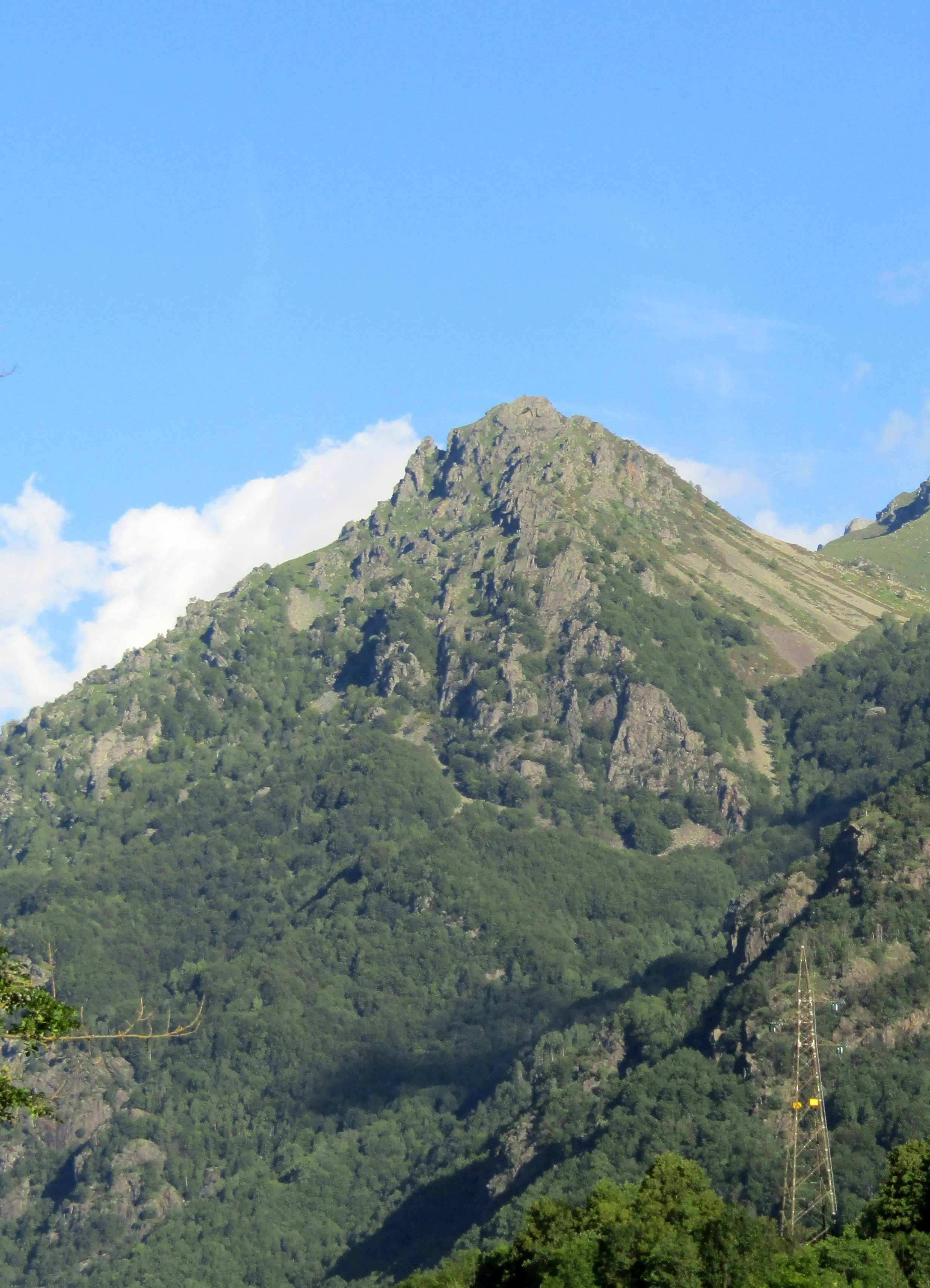 Il Monte Tumolera (Alpi Graie) visto da Villa di Lemie